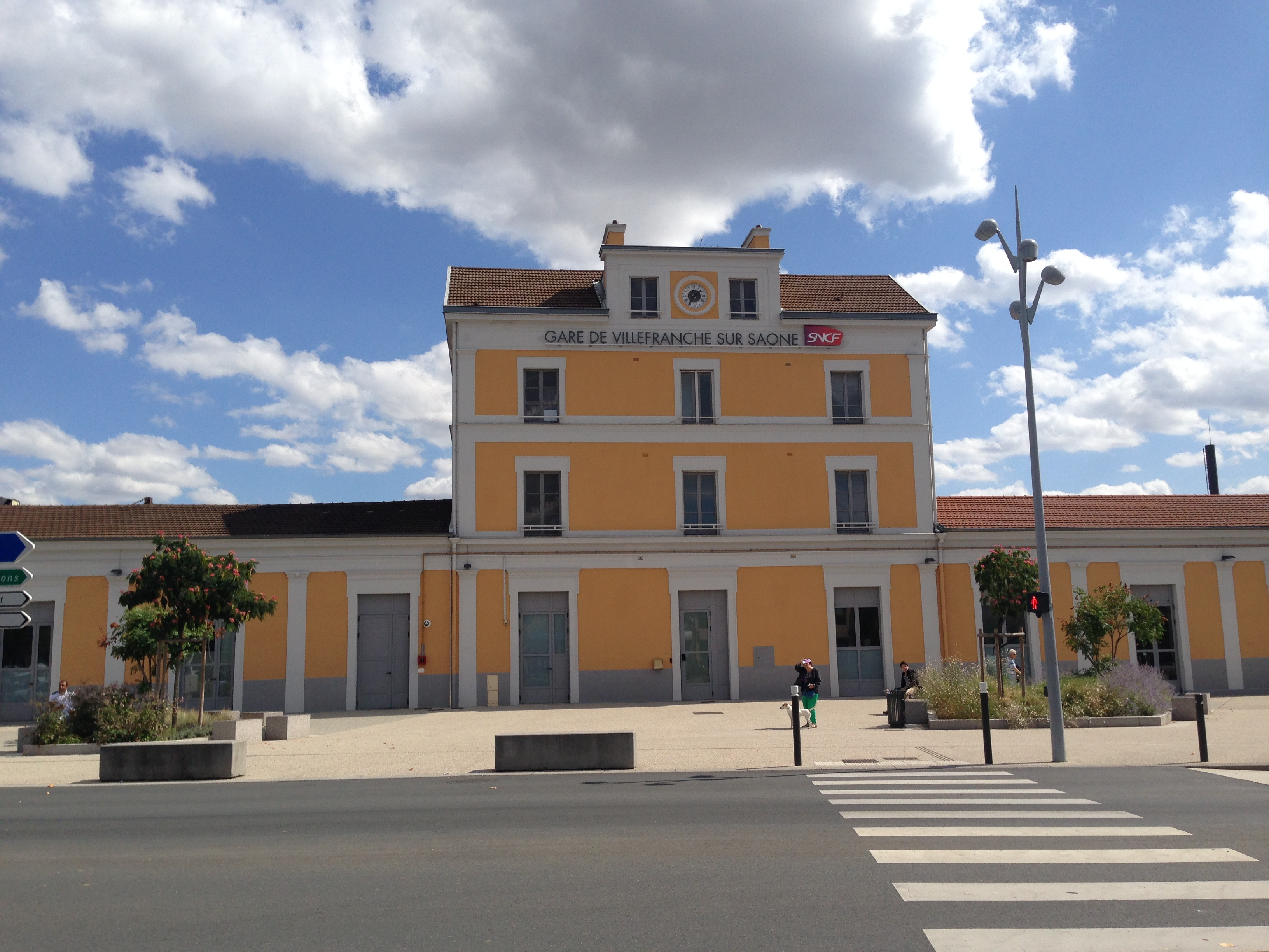 法国索恩河畔自由城站